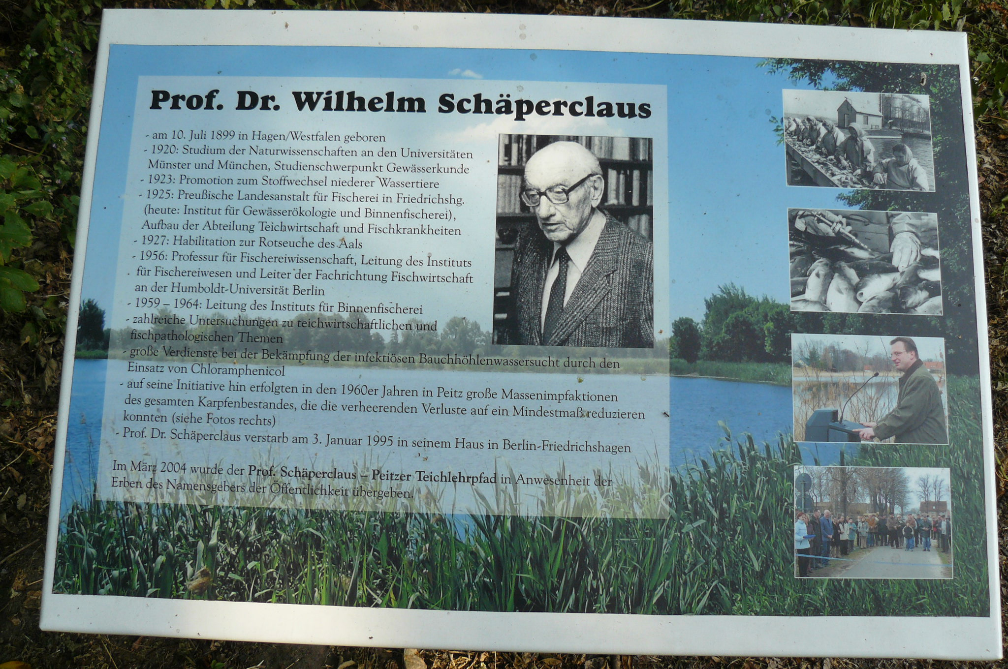 Tablica w Peitz.